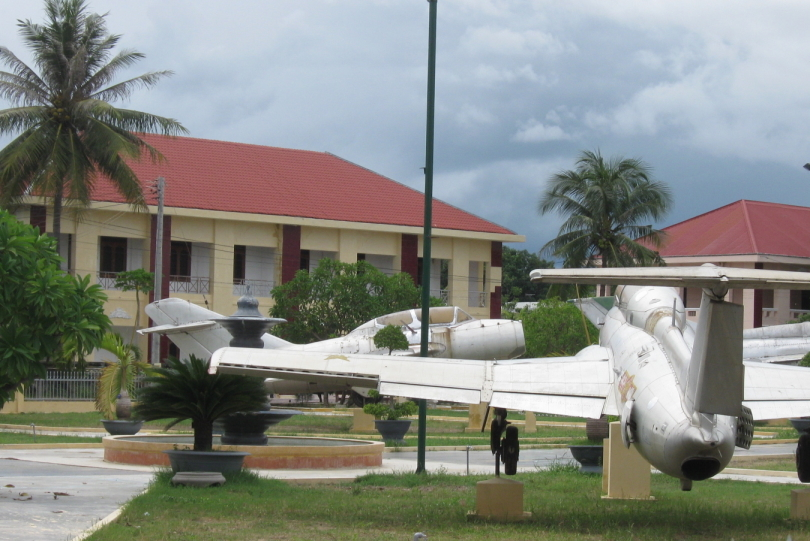 Авиаэкспонаты на территории учебной лётной базы Вьетнамской народной армии на территории бывшей американской авиабазы Нячанг (Нячанг, Кханьхоа, Вьетнам)